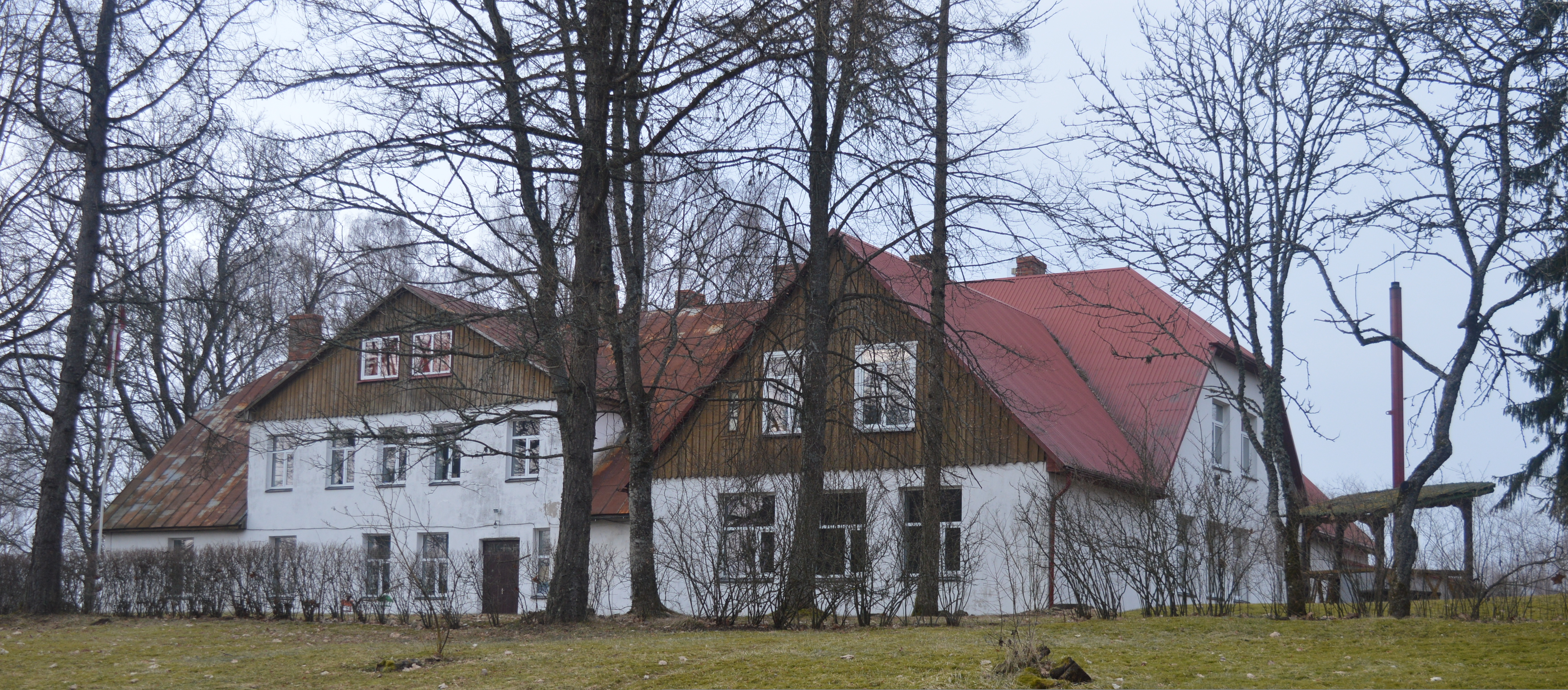 Zaņas skola